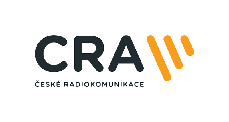 Logo ČRA